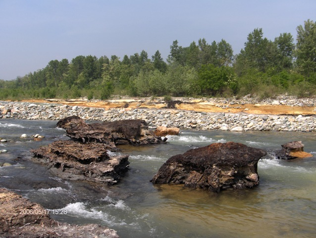 Resti vegetali fossili nell'alveo della Stura di Lanzo nei pressi di Nole e Cirié. Autore: Tapion